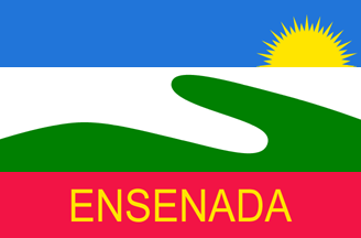 Bandera del Partido de Ensenada (Buenos Aires, Argentina).